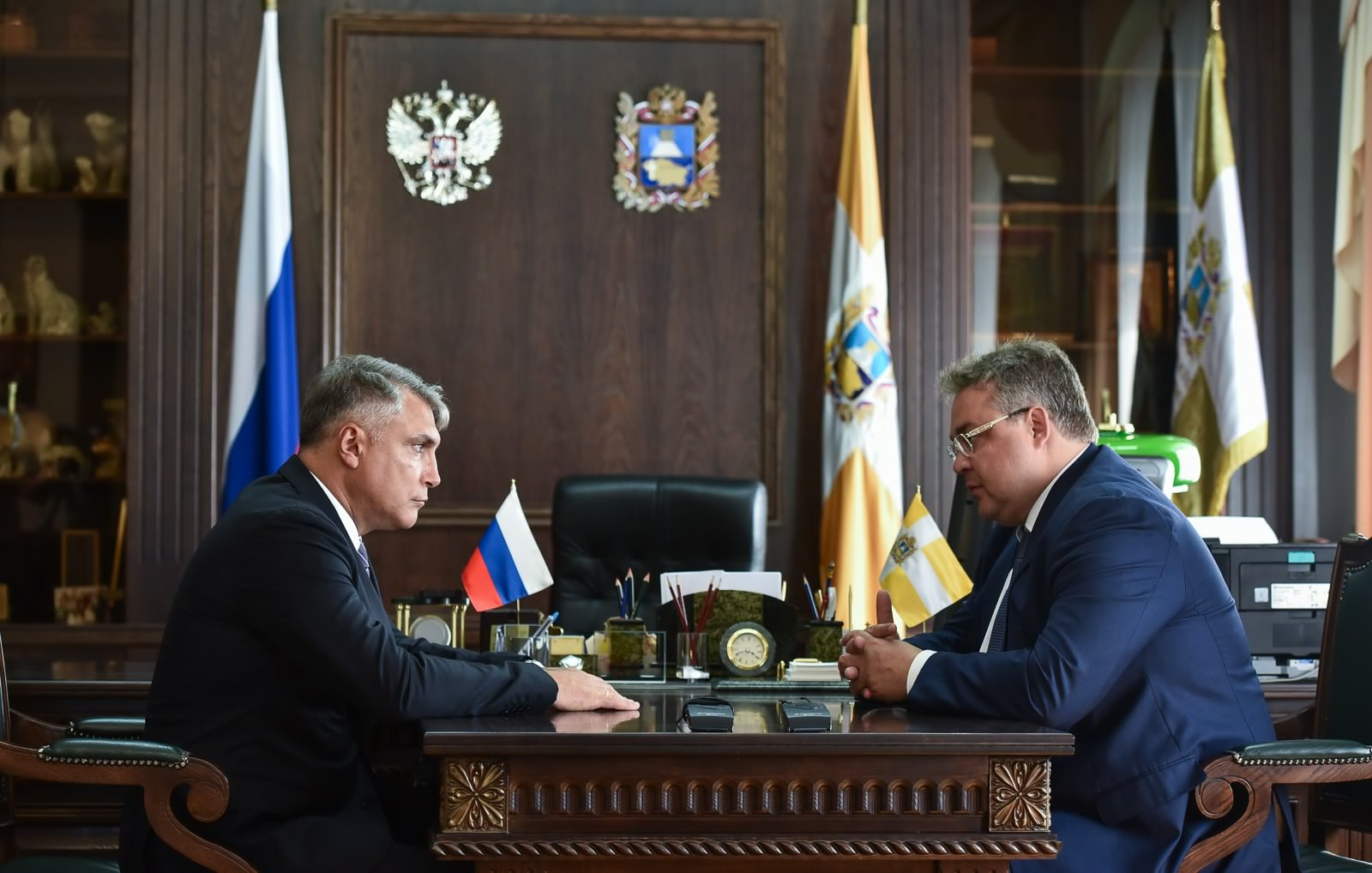 Полномочный представитель Президента РФ в СКФО Александр Матовников совершил рабочую поездку по Ставропольскому краю.